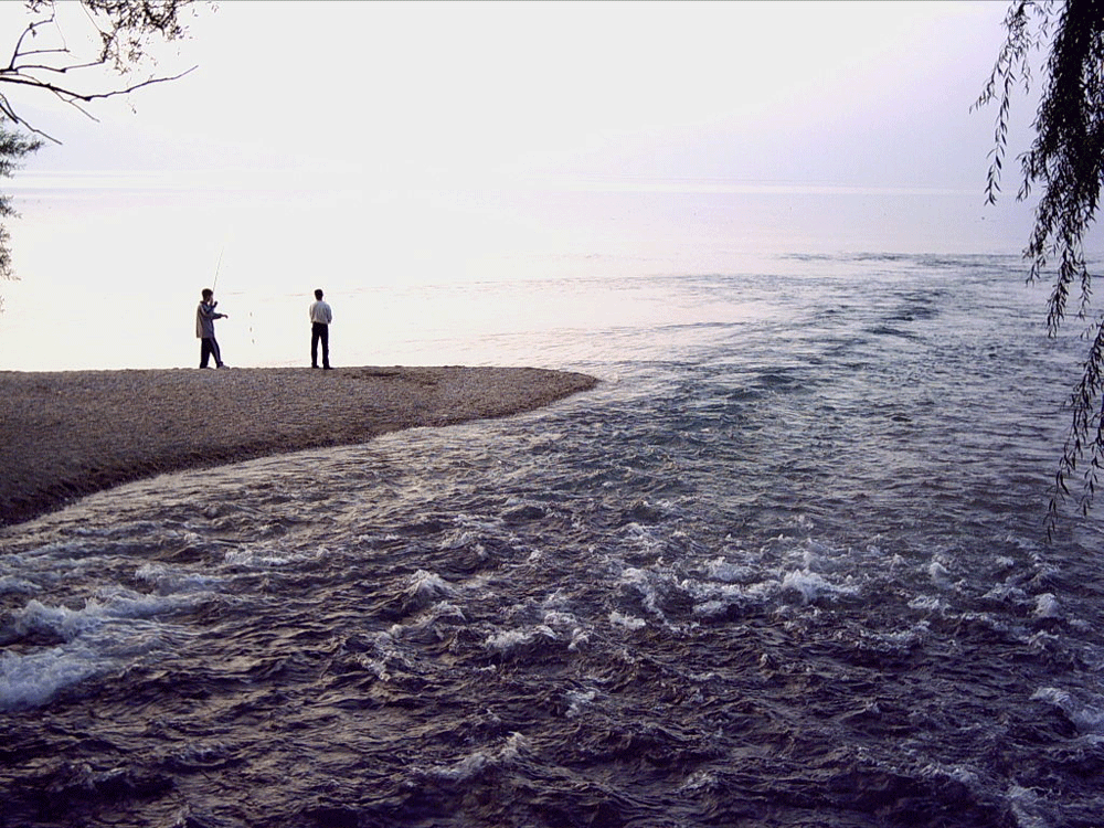 Vlezot na Crni Drim vo Ohridskoto Ezero